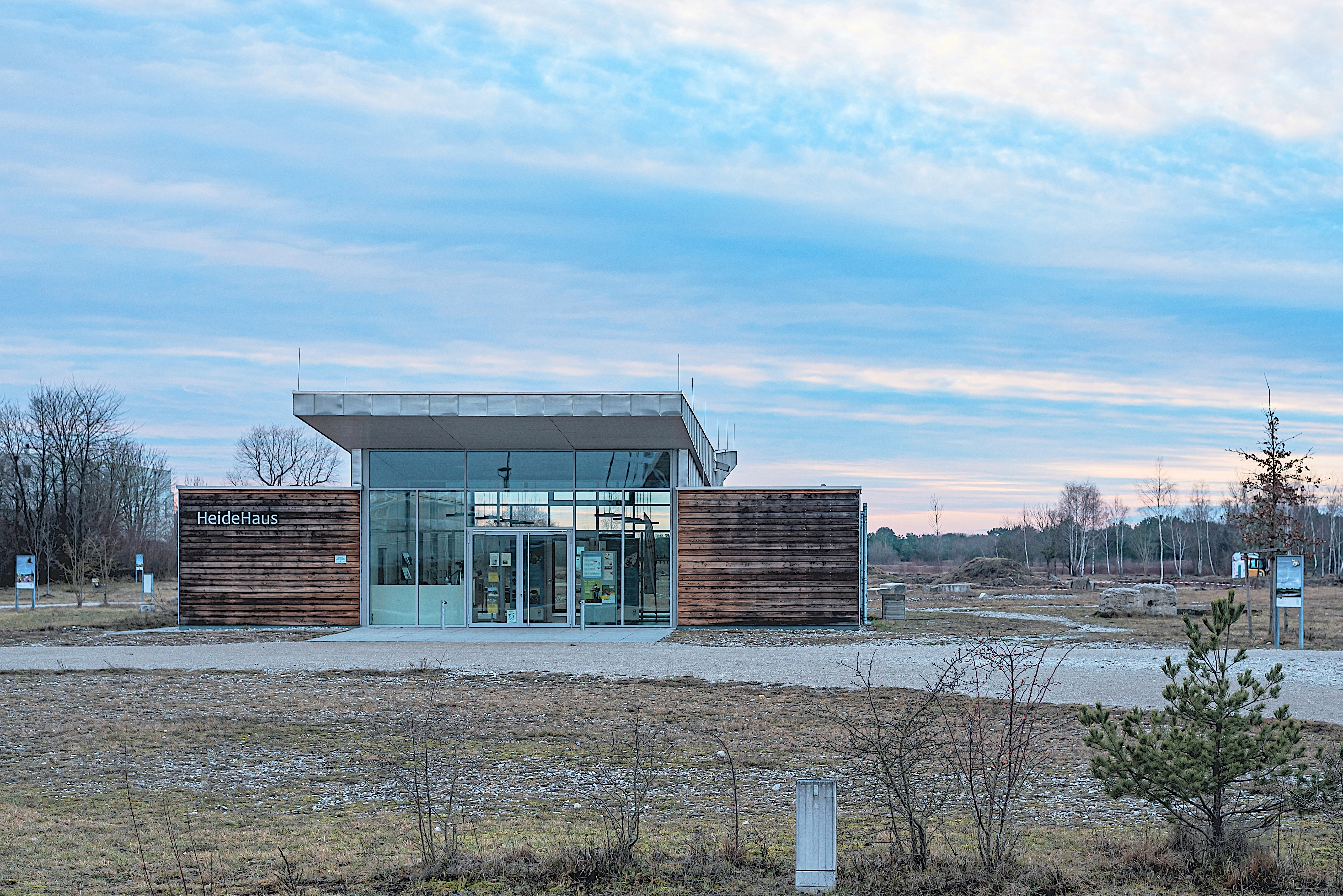 Das Heidehaus in der Südlichen Fröttmaninger Heide.